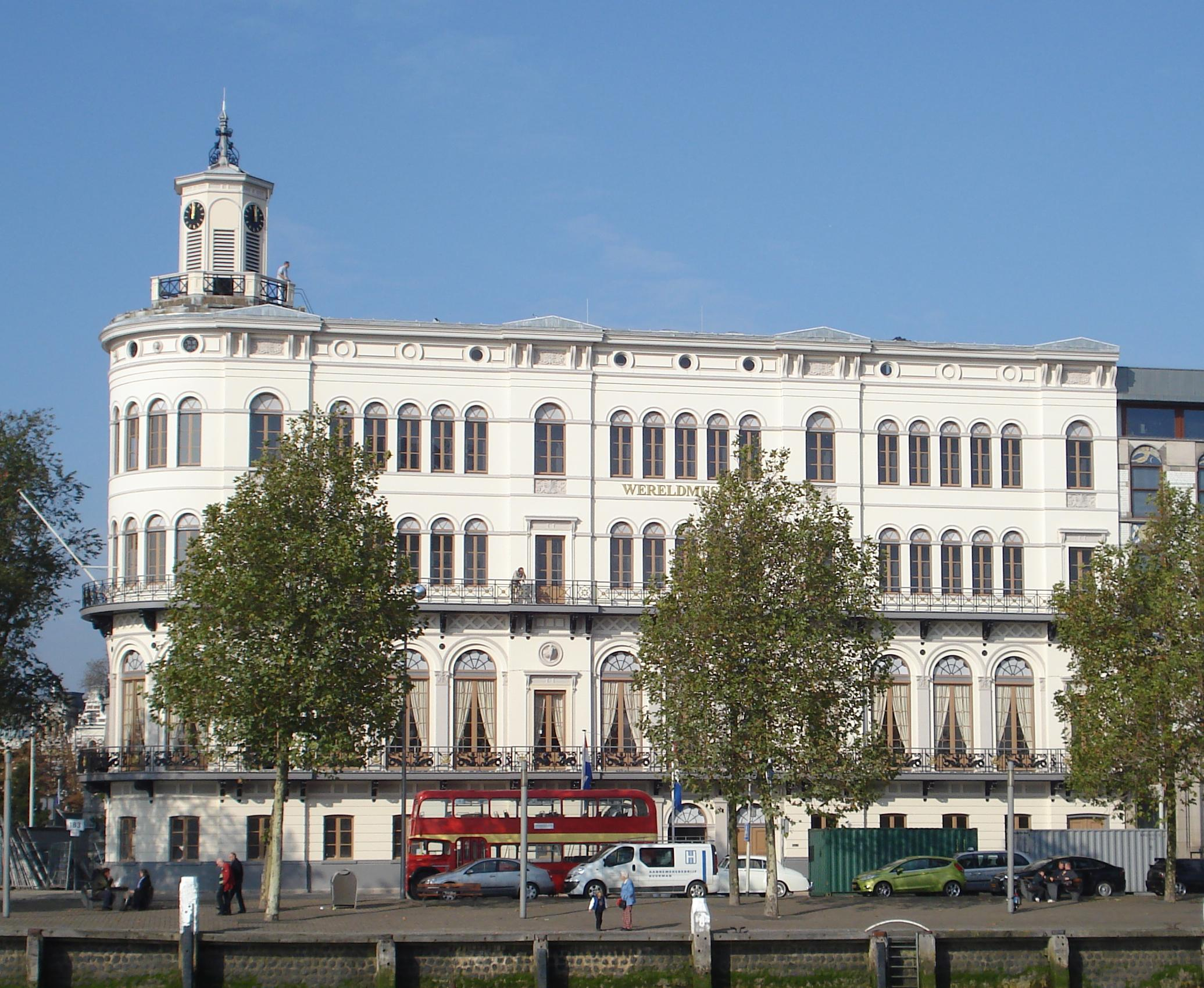 Rotterdam Willemskade, Wereldmuseum. Rijksmonument.